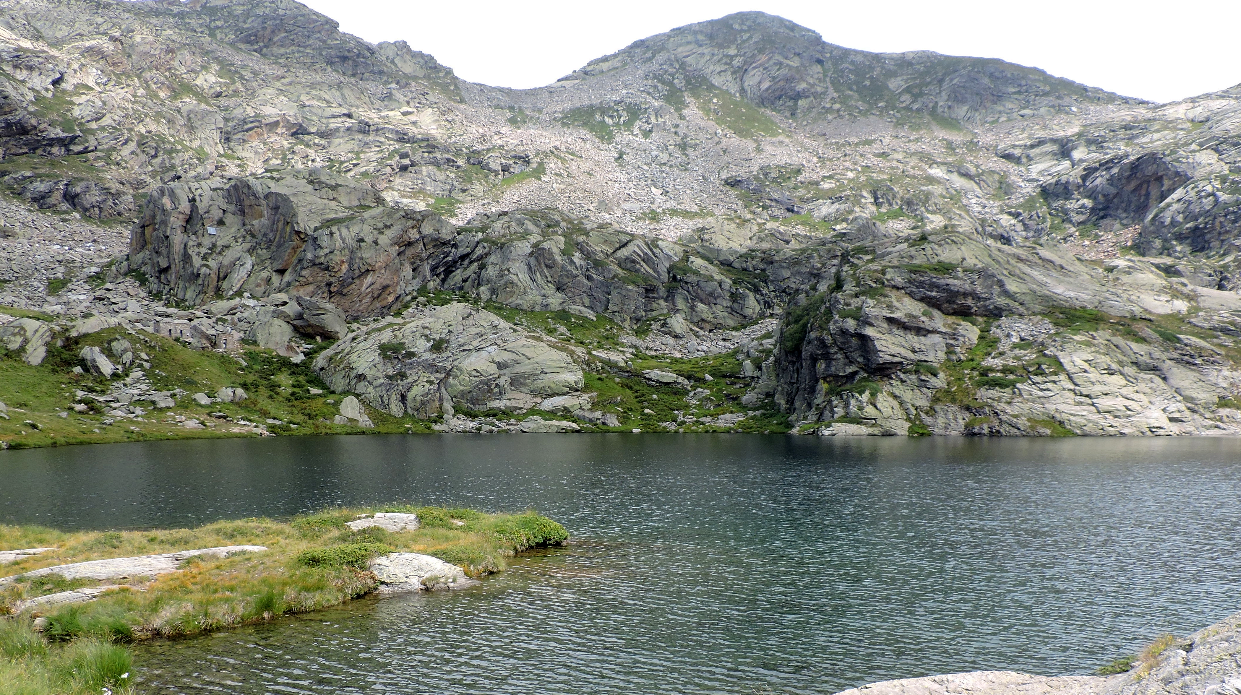 Mont Mars (Q47466367)